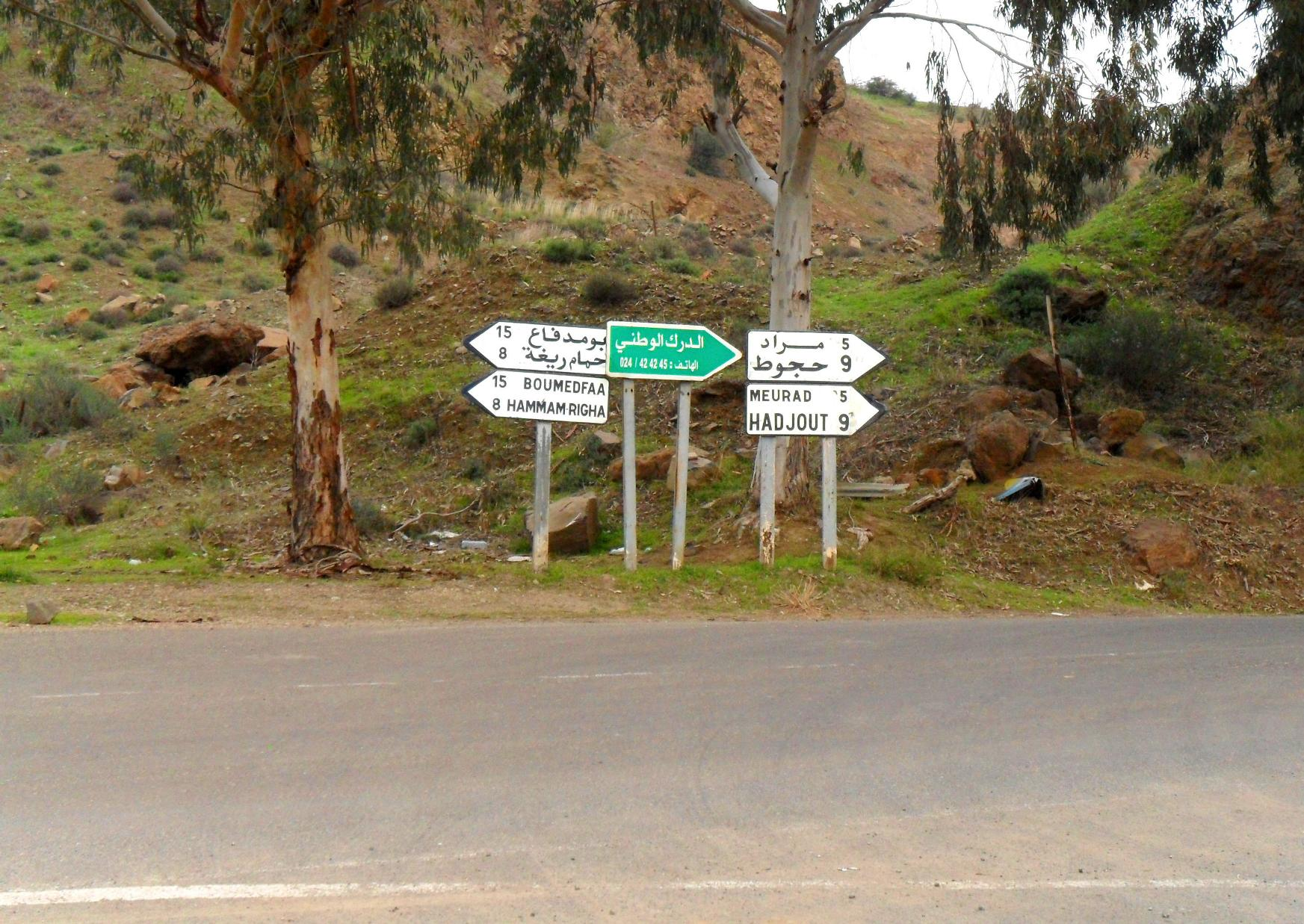 Meurad - Bourkika - Boumedfaa